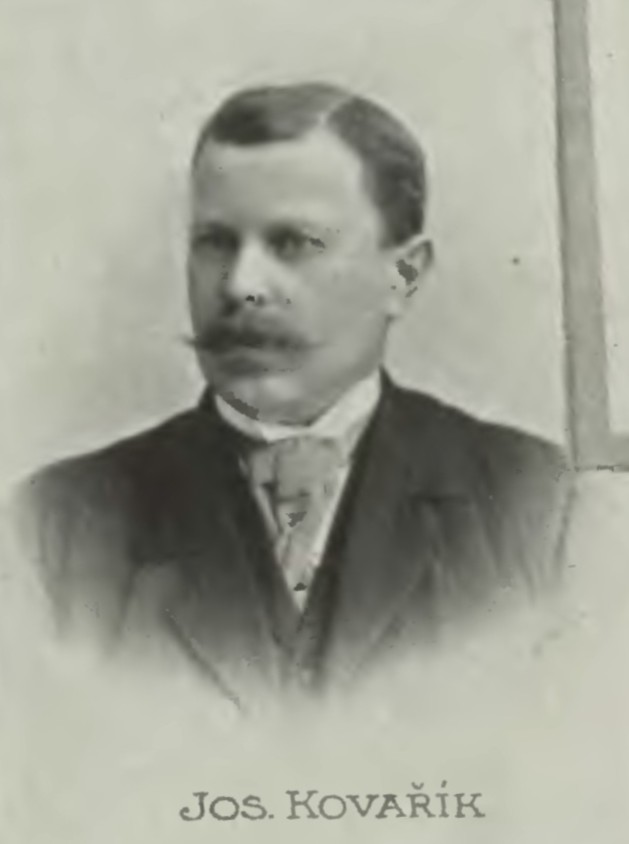 Portrét – Josef Kovařík (1855-???), Český rolník a politik.